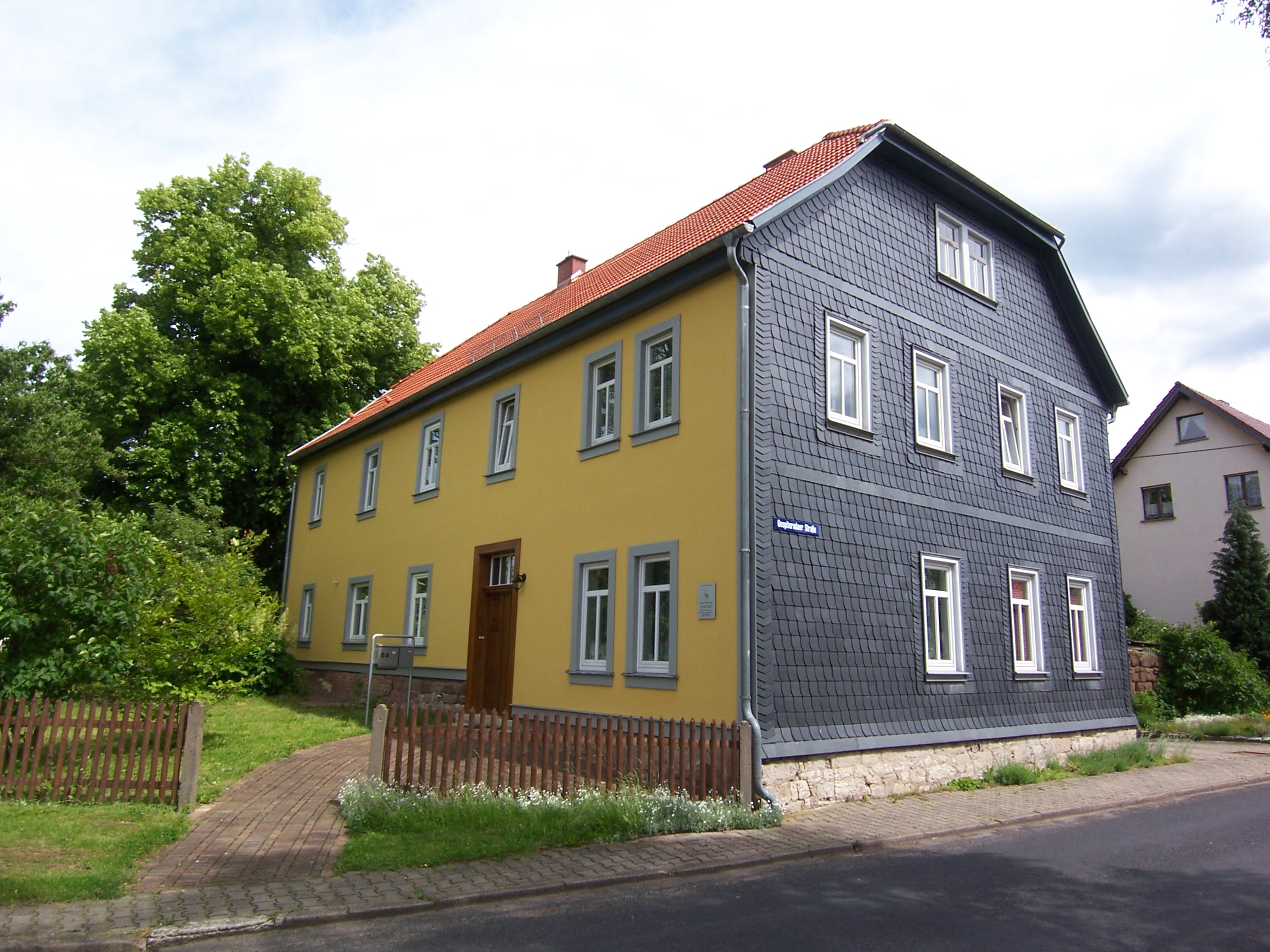 In diesem Pfarrhaus in Leina wurde 1789 Wilhelm Hey (Pfarrer, Fabel- und Liederdichter) geboren. Seine bekanntesten Lieder sind "Weißt du, wie viel Sternlein stehen", "Alle Jahre wieder", "Vöglein im hohen Baum".